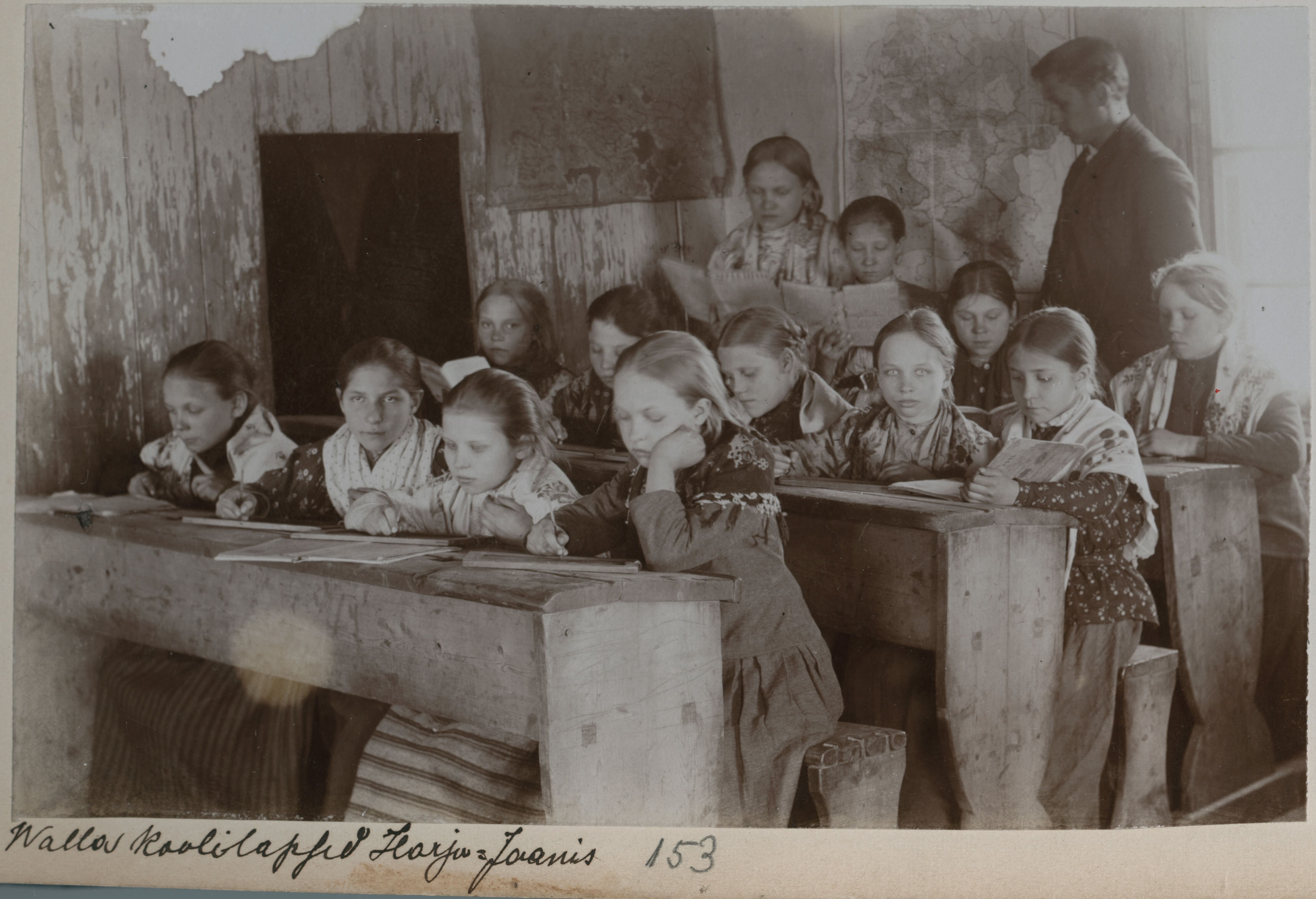 Valla koolilapsed Peningil, Harju-Jaanis.